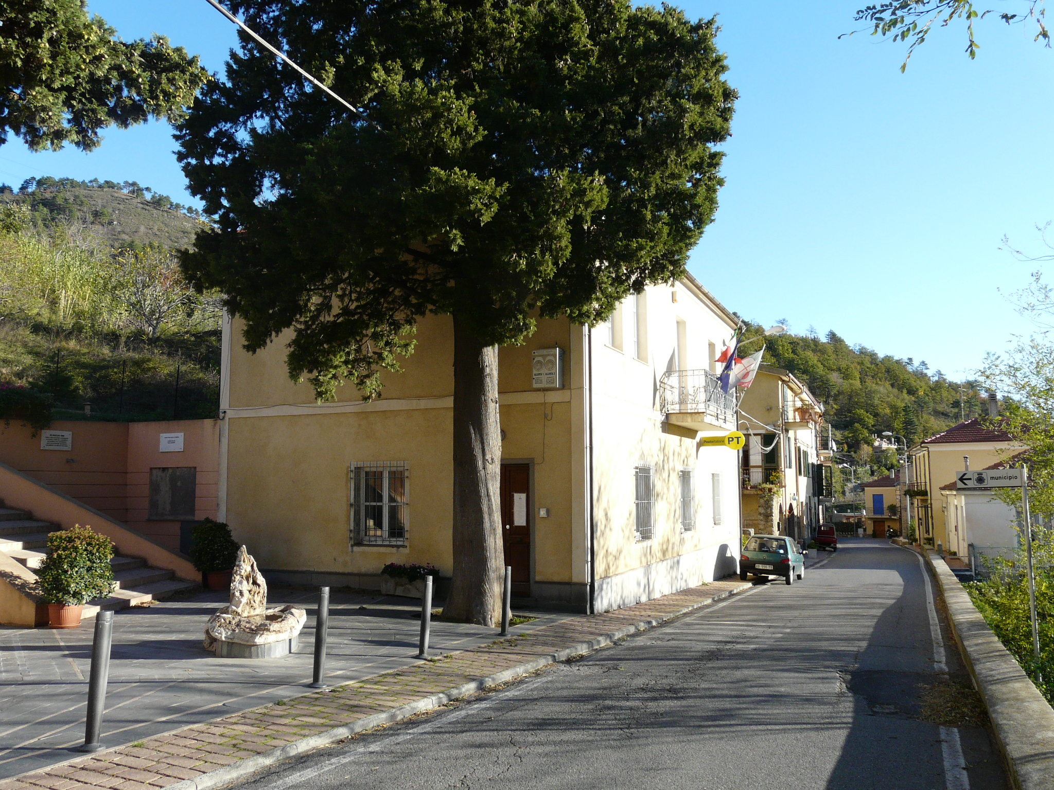 Municipio di Balestrino, Liguria, Italia